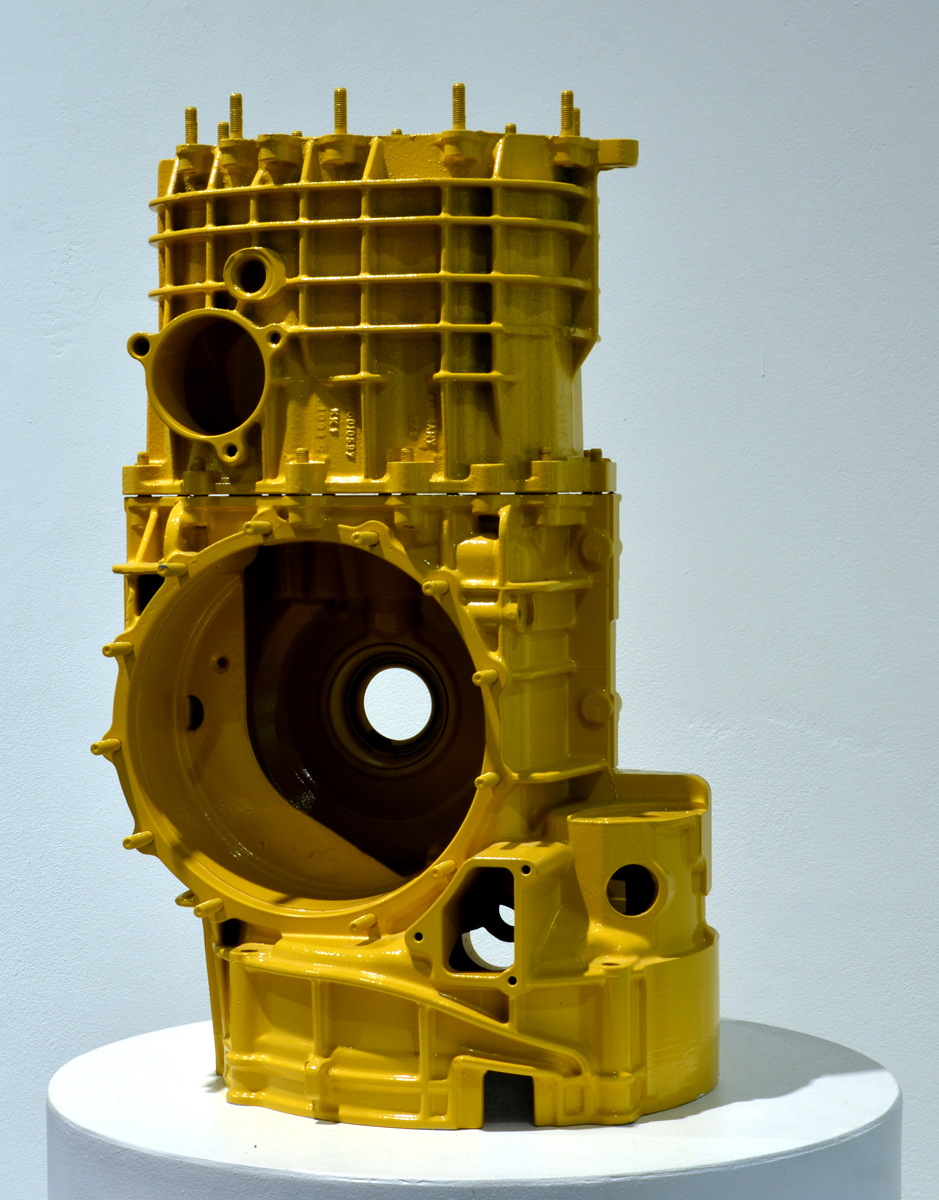 Theodor Pištěk, Bart Simpson, 2003